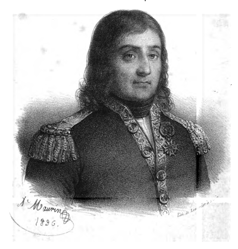 Jacques Cassard